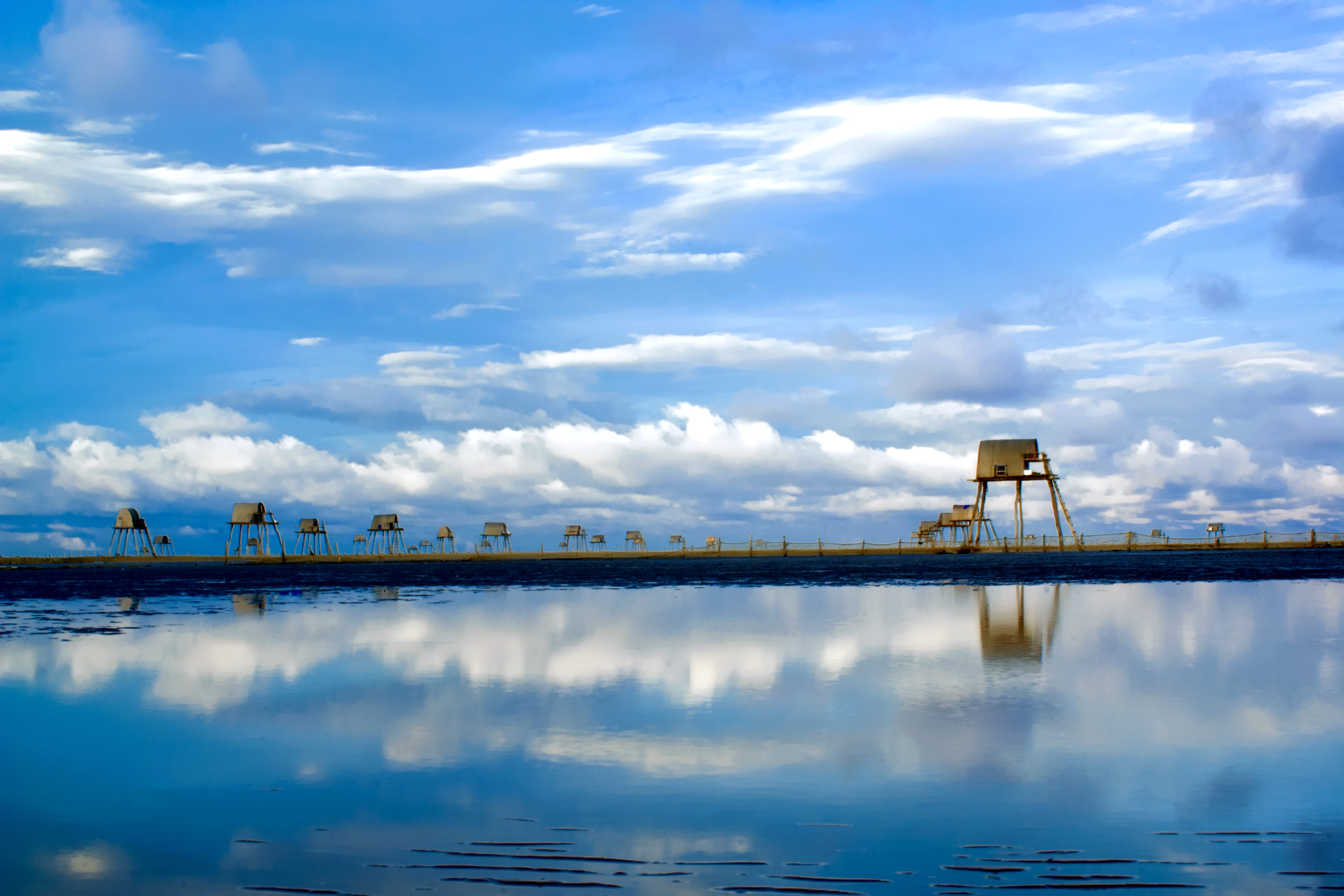 Đồng Châu, Đông Minh, Tiền Hải, Thái Bình, Vietnam